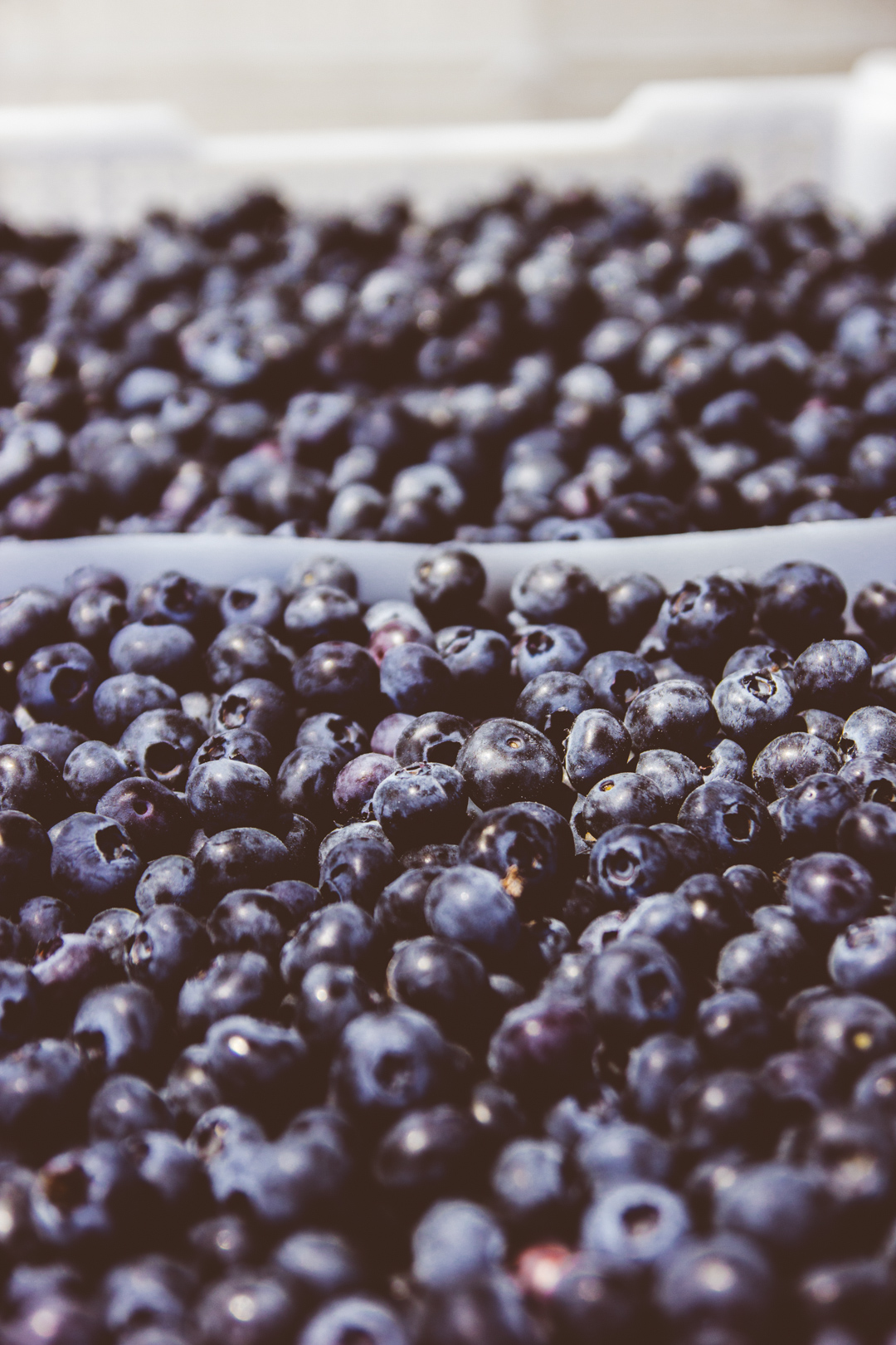 Arándanos en bandeja